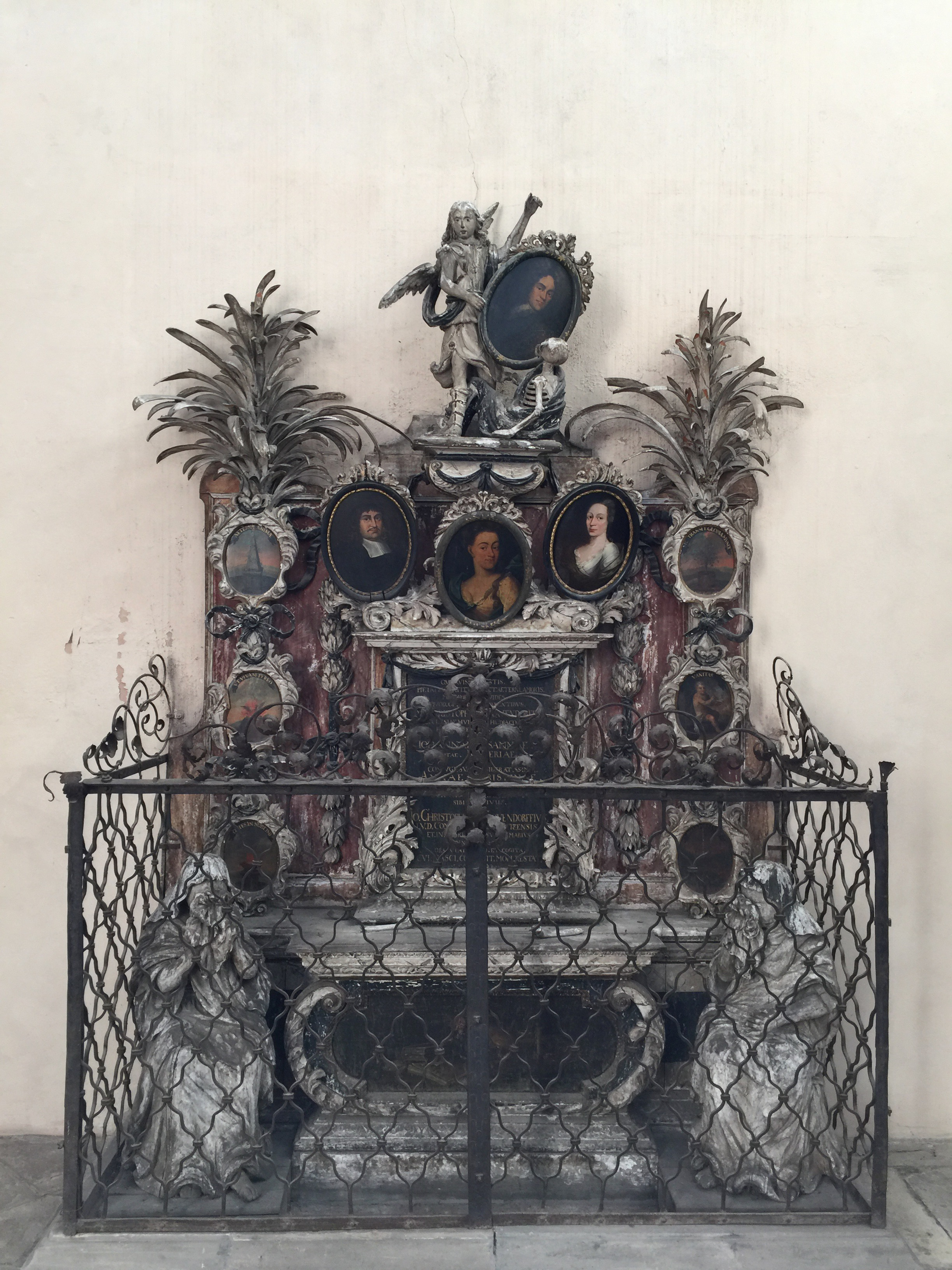 Epitaph von Frauendorff in der Wentzelskirche in Naumburg (1707)